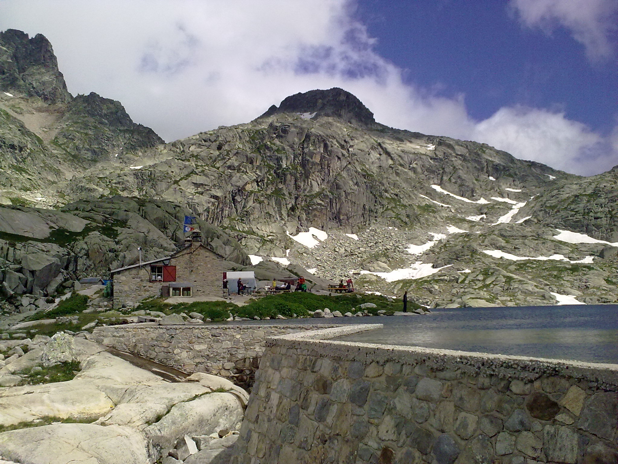 Le refuge d'Arrémoulit le 25 juillet 2010. Le lac d'Arrémoulit à droite avec le barrage.